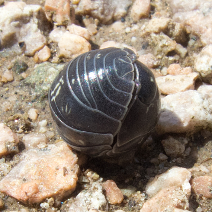 Мокрица-броненосец обыкновенная / Armadillidium vulgare / (Common) pill-bug, (Common) pill woodlouse, Roly-poly, Doodle bug, or Carpenter